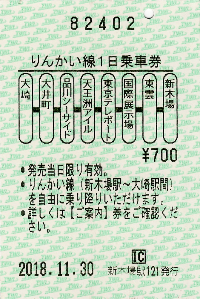 東京臨海高速鉄道 りんかい線1日乗車券